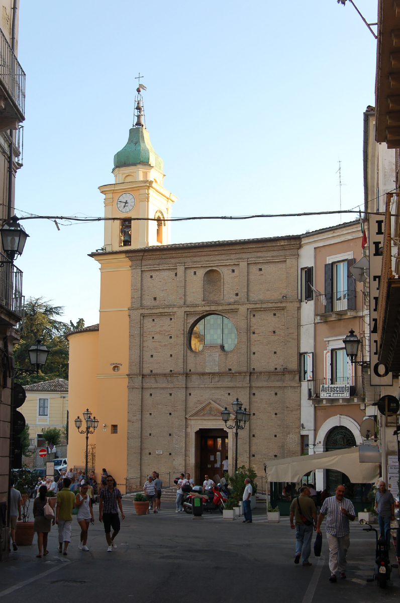 Chieti City 2011